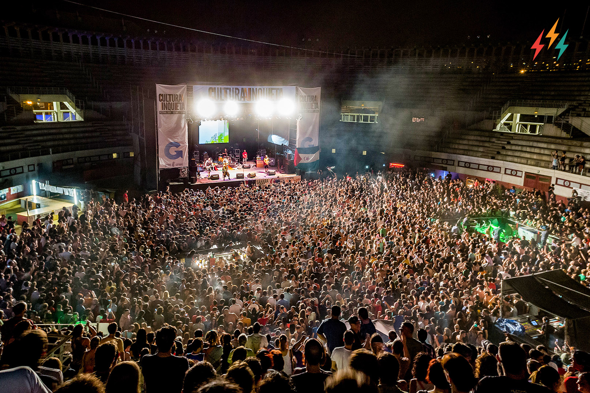 Concierto de Manu Chao en Festival Cultura Inquieta